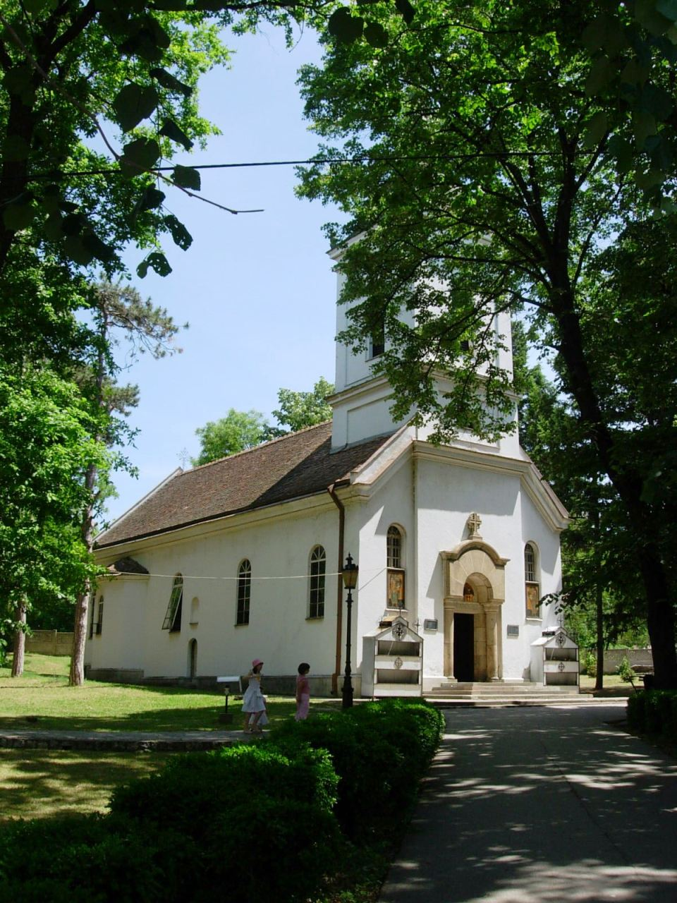 Саборна црква у Пожаревцу.